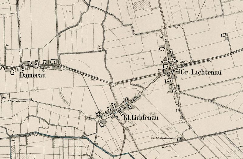 Landkarte mit Lage der Dörfer Groß Lichtenau und Klein Lichtenau in Westpreußem